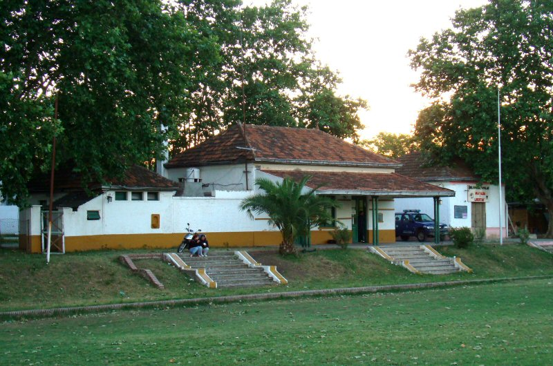 Estación Arturo Seguí del FCGB, ex FCPBA